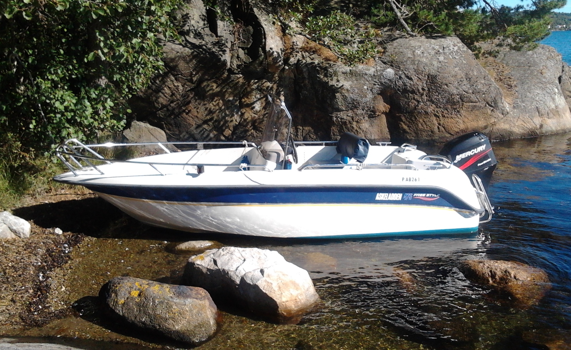 Askeladden 475 Freestyle 2001 modell med 50 hk Merecury